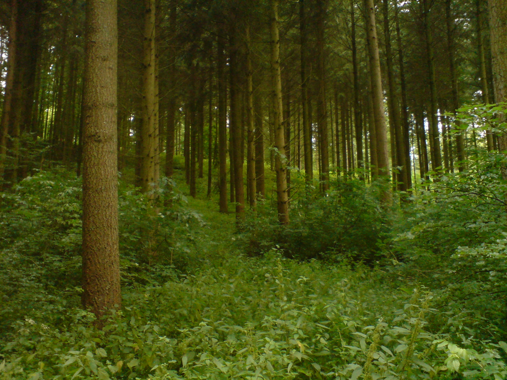 Fichten-Douglasienforst in der Weidach, Neckar-Odenwald-Kreis